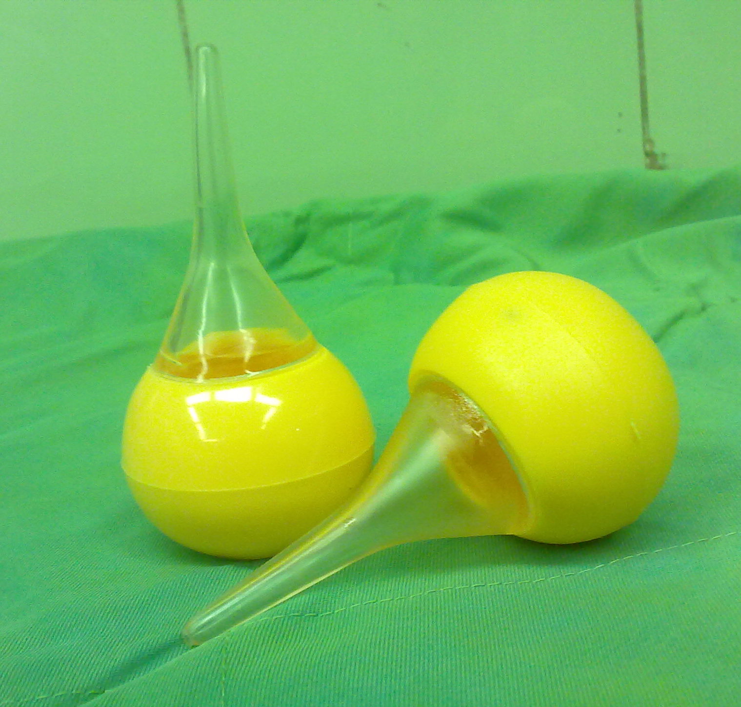 پوار : وسیله ای که جهت تخلیه ترشحات جنینی از بینی و دهان نوزادان در هنگام تولد مورد استفاده قرار می گیرد.